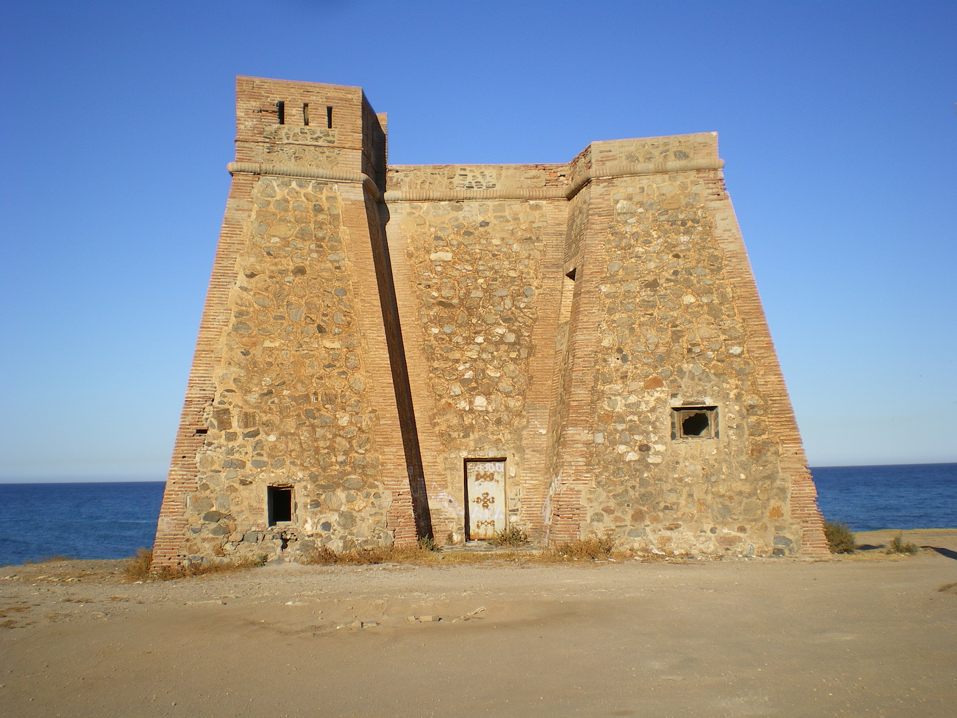 Fotografía de Torre de Macenas, en Mojácar, Almería, España, con el mar de levante a la espalda. Tomada desde el oeste. Torre defensiva tipo pezuña.